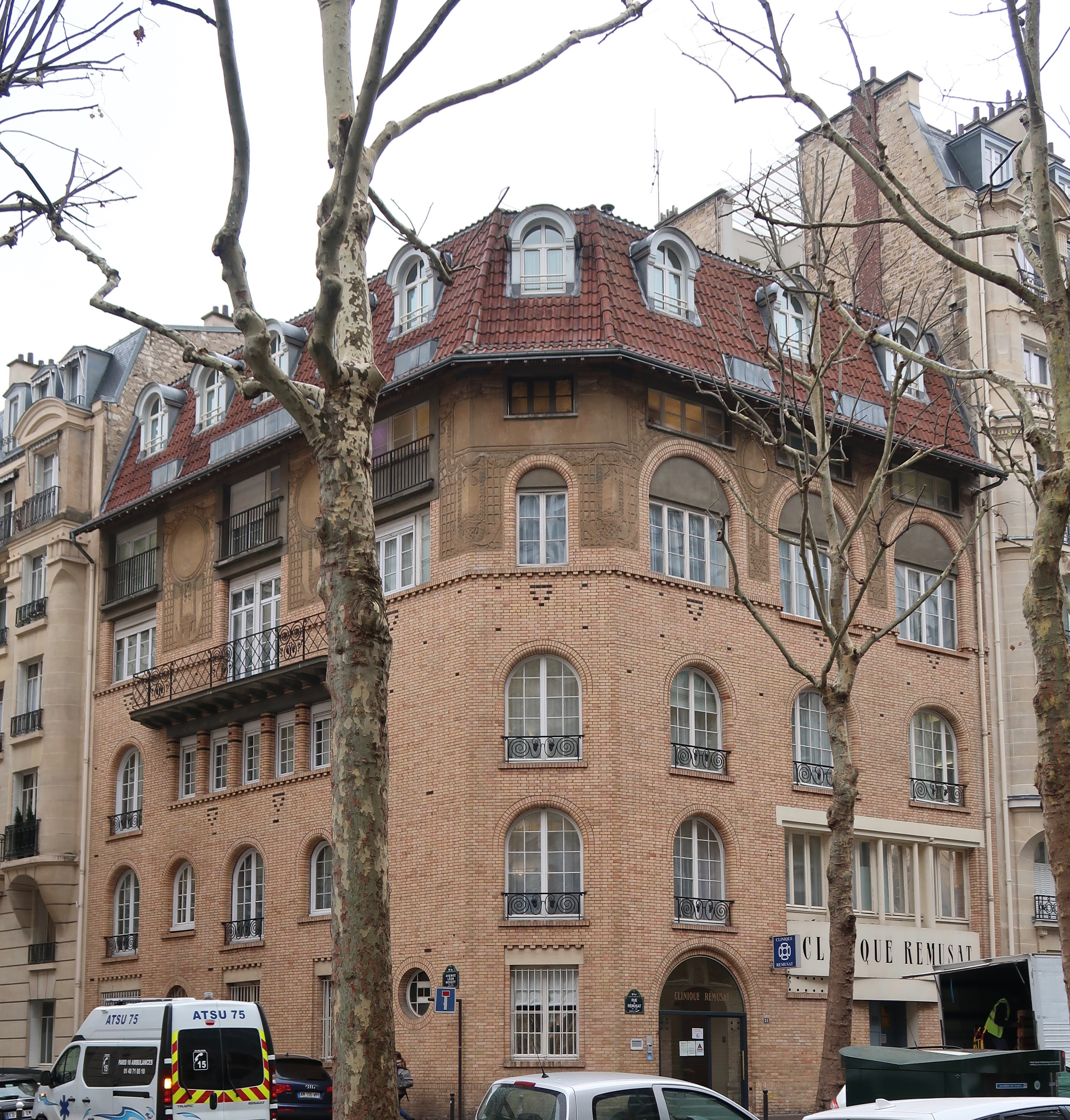 Clinique Rémusat, 21 rue de Rémusat (Paris, 16e).